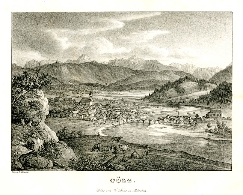 Tölz, Blick vom Kalvarienberg über die Isar, Kreidelithographie, Verlag Fr. Sauer, München